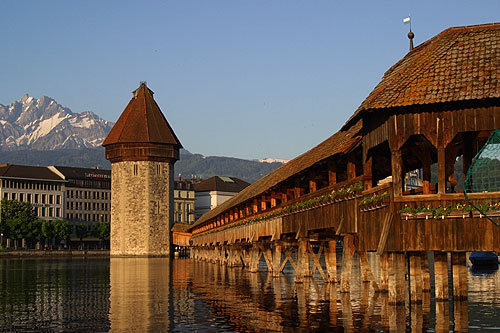 Kapellbrücke und Wasserturm in Luzern (Nr. 03.1-4645)